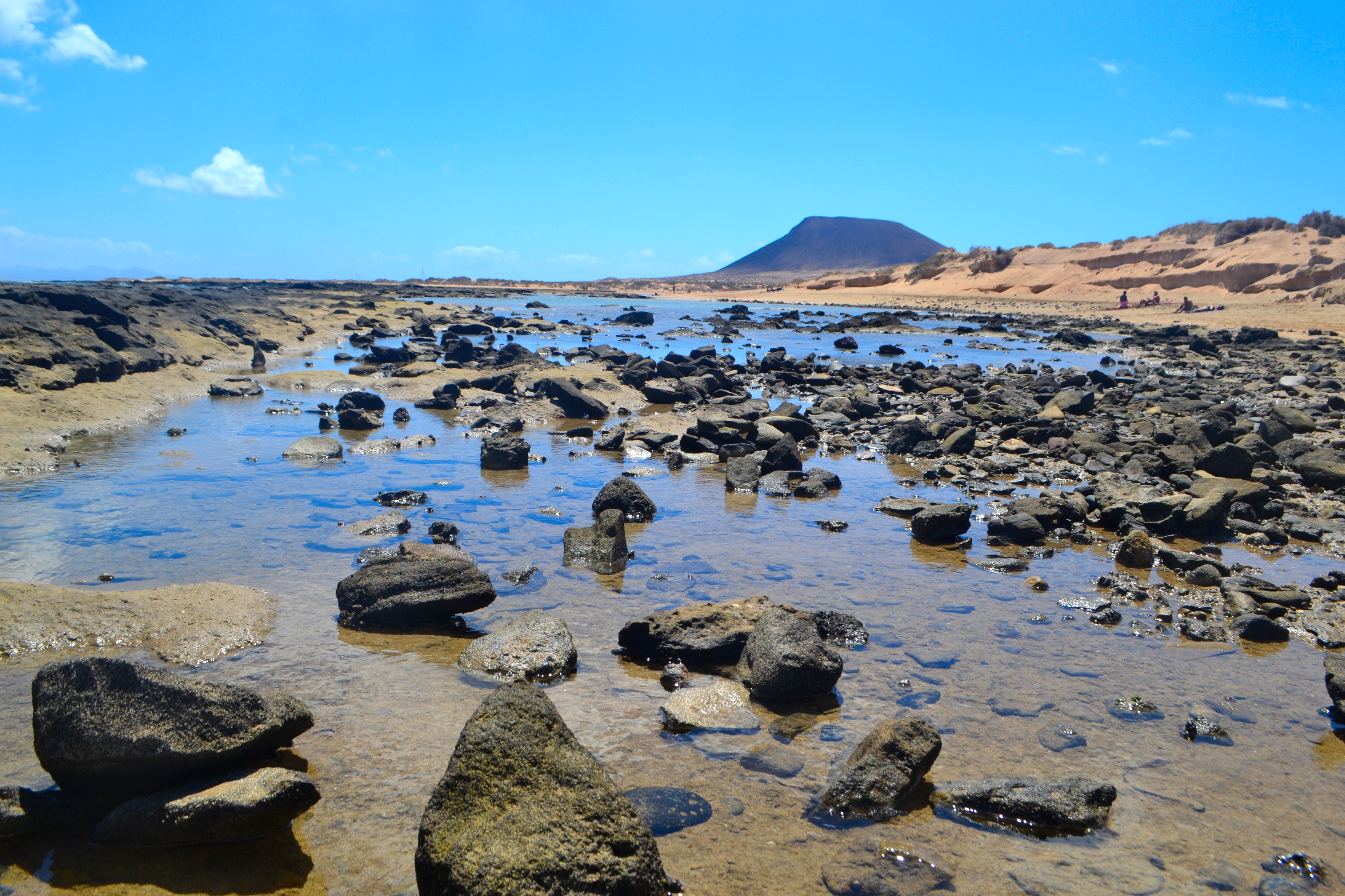 Archipiélago Chinijo This is a photography of a Special Area of Conservation in Spain with the ID: ES7010045. Natura2000 entry, EEA entry